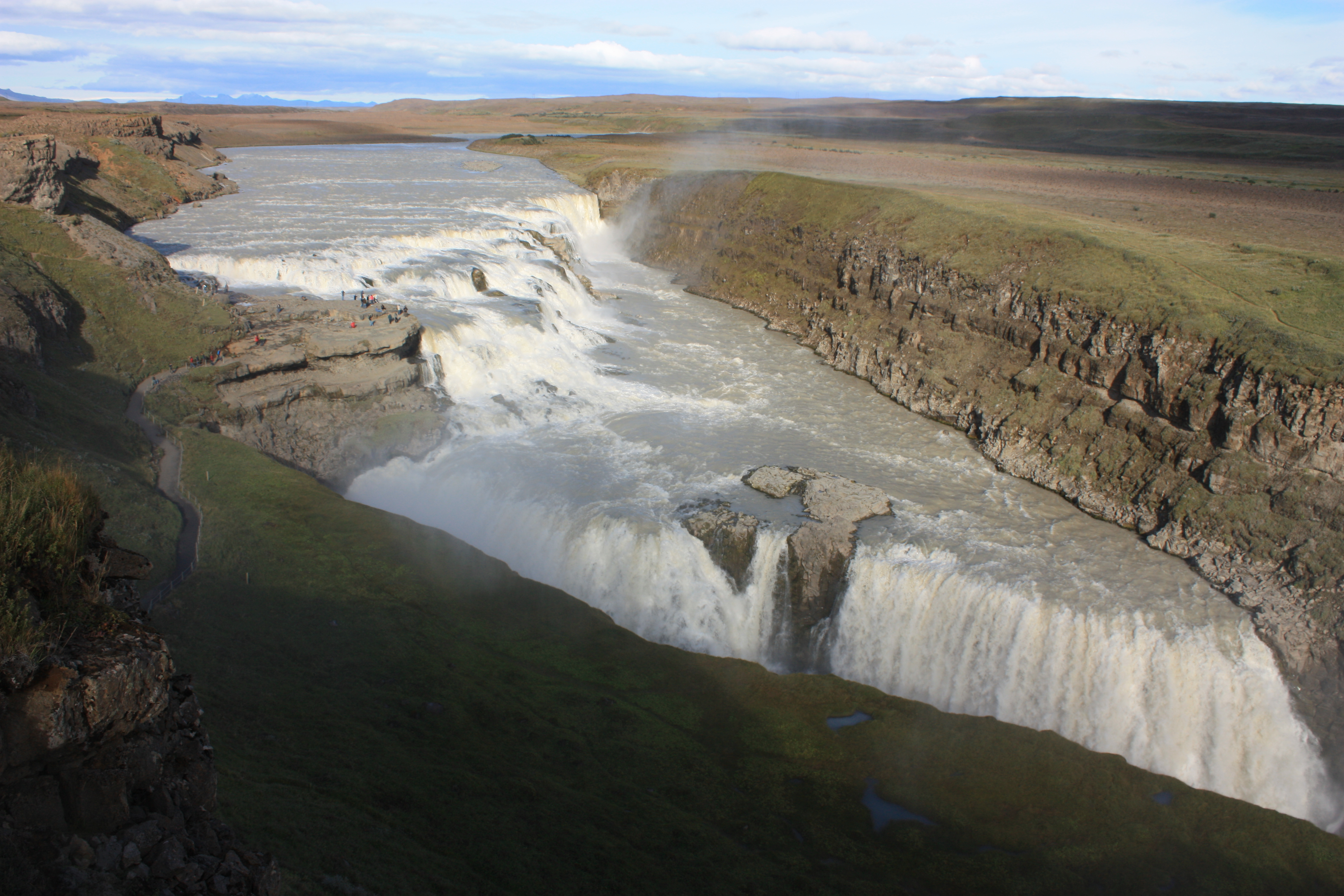 Gullfoss